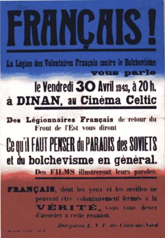 Affiche de recrutement de la Légion des Volontaires Français contre le bolchévisme, est une unité militaire créée en France en 1941 pour combattre aux côtés de l'armée nazie.